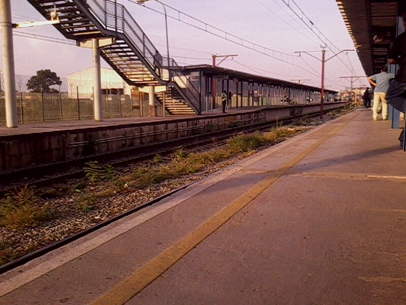 Interior da Estação Engenheiro Manoel Feio da CPTM